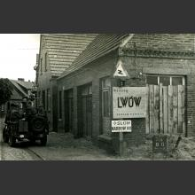 Haren przemianowyny na Lwów